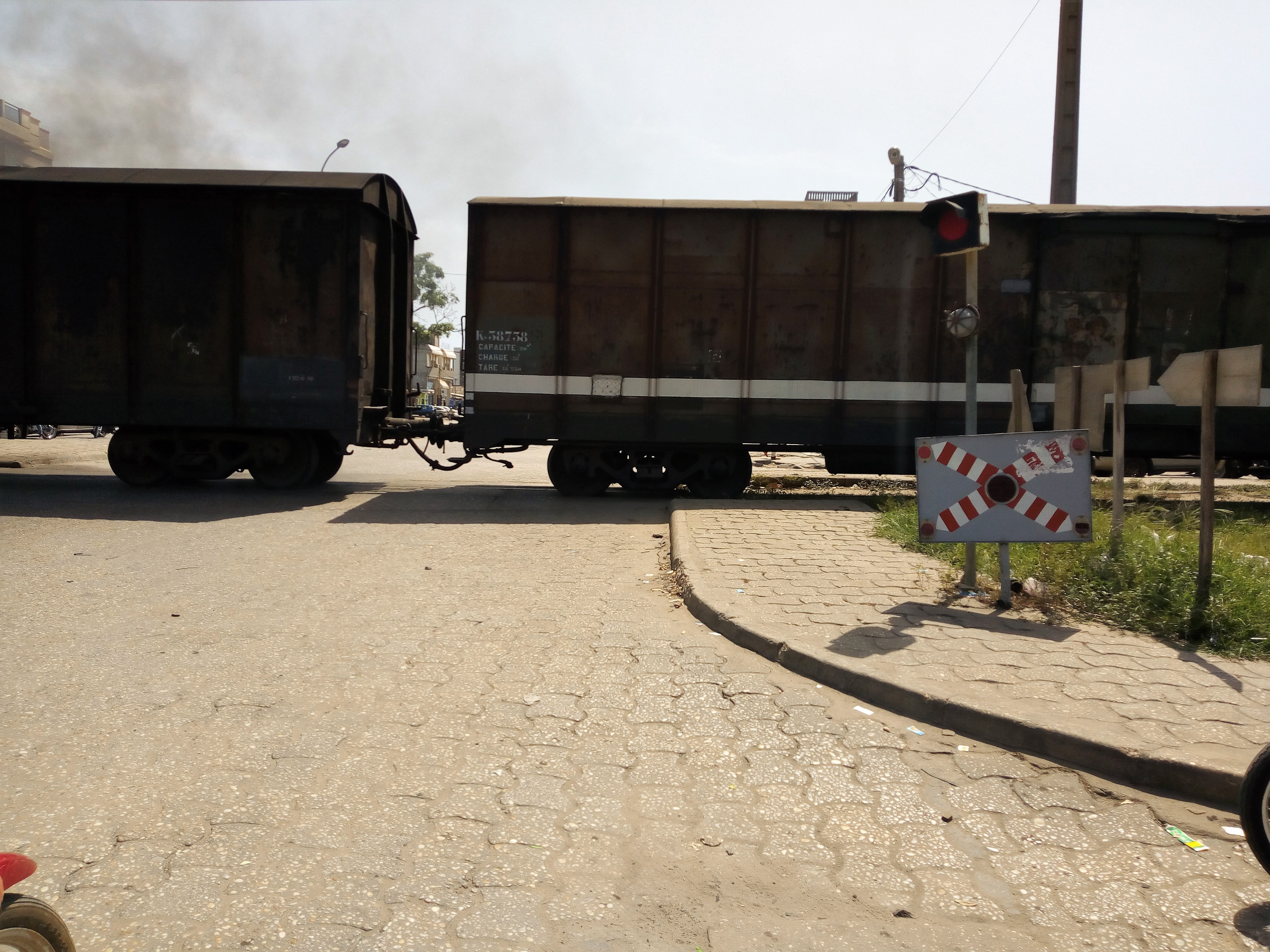 Deux wagon de train de passage a Cotonou Bénin. ce n'est qu’après le passage du train que la voie sera libérée pour le passage.